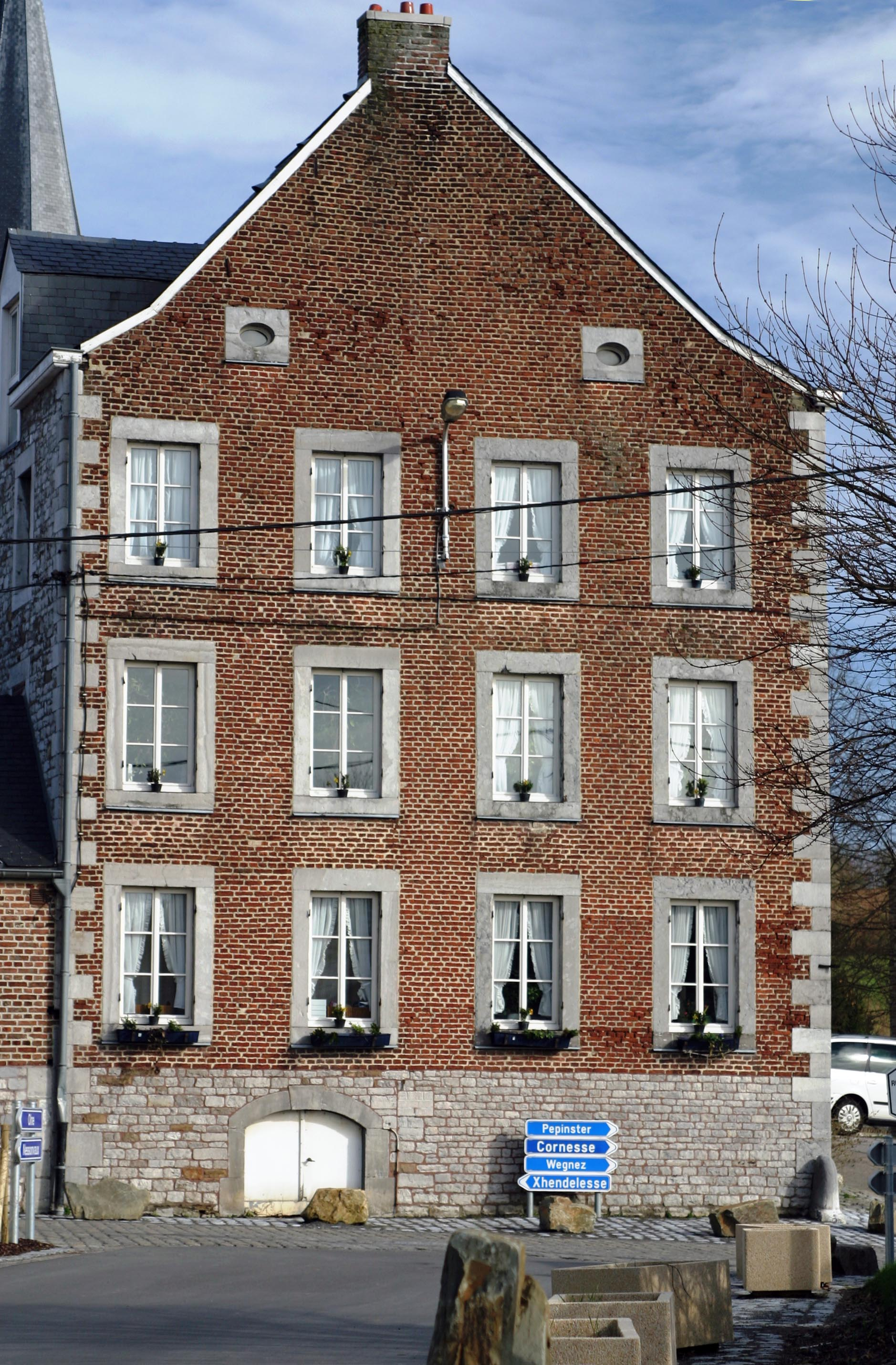 Soiron Giewel2